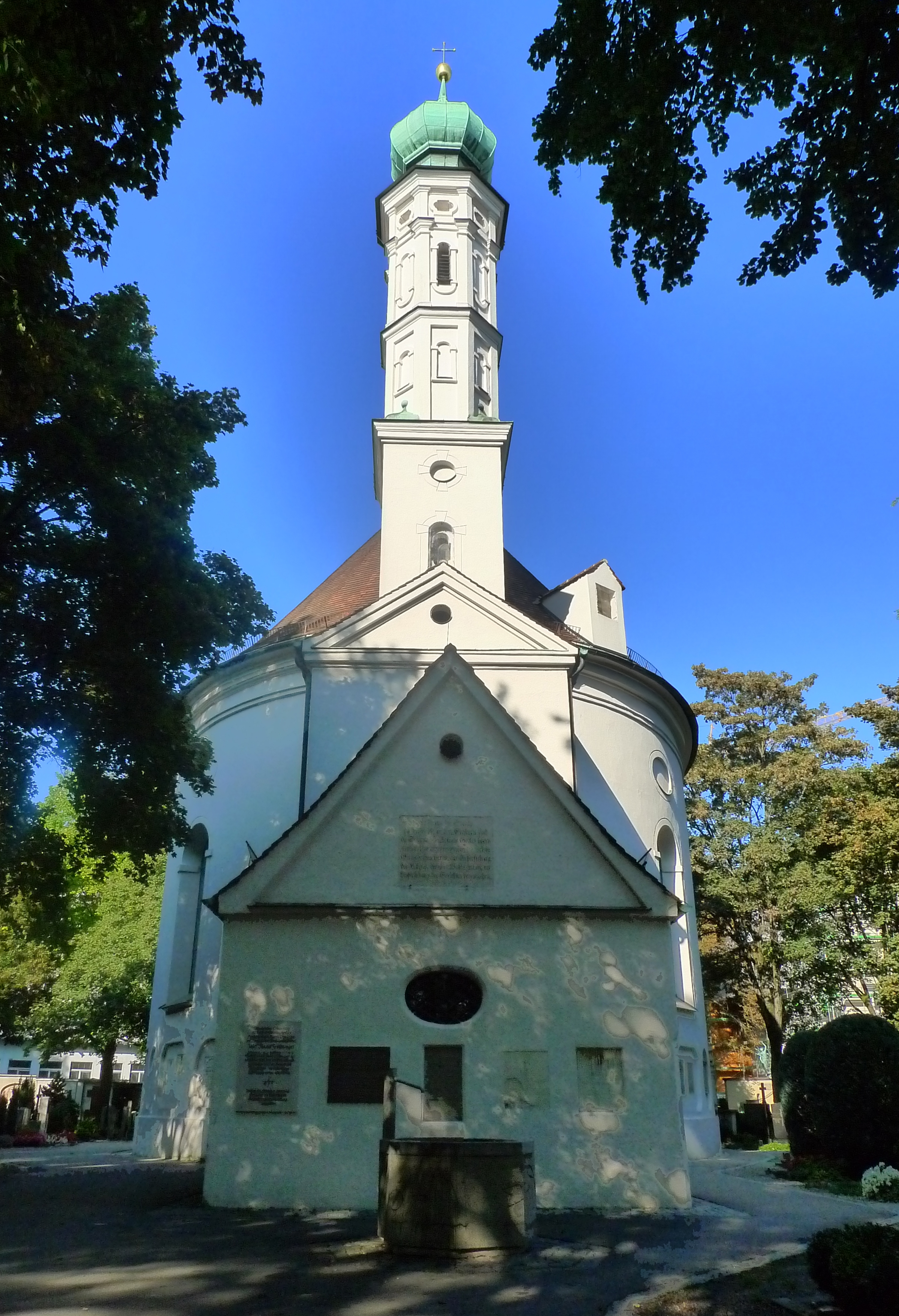 Katholische Friedhofskapelle St. Michael in Augsburg; Filialkirche von St. Moritz. Längsovaler Zentralbau . Turm mit Zwiebelkuppel und oktogonalen Obergeschossen. Von 1603 bis 1605 errichtet. Wahrscheinlich von Elias Holl, was aber nicht gesichert ist. Lediglich die Bauidee gibt Hinweis auf einen Holl`schen Ursprung. Bautafel mit lateinischer Inschrift: "Deo conditori Redemptorique et Angelis Piar Animar Patronis Dedicatum Anno MDCIV" Augsburg, Hermanstraße